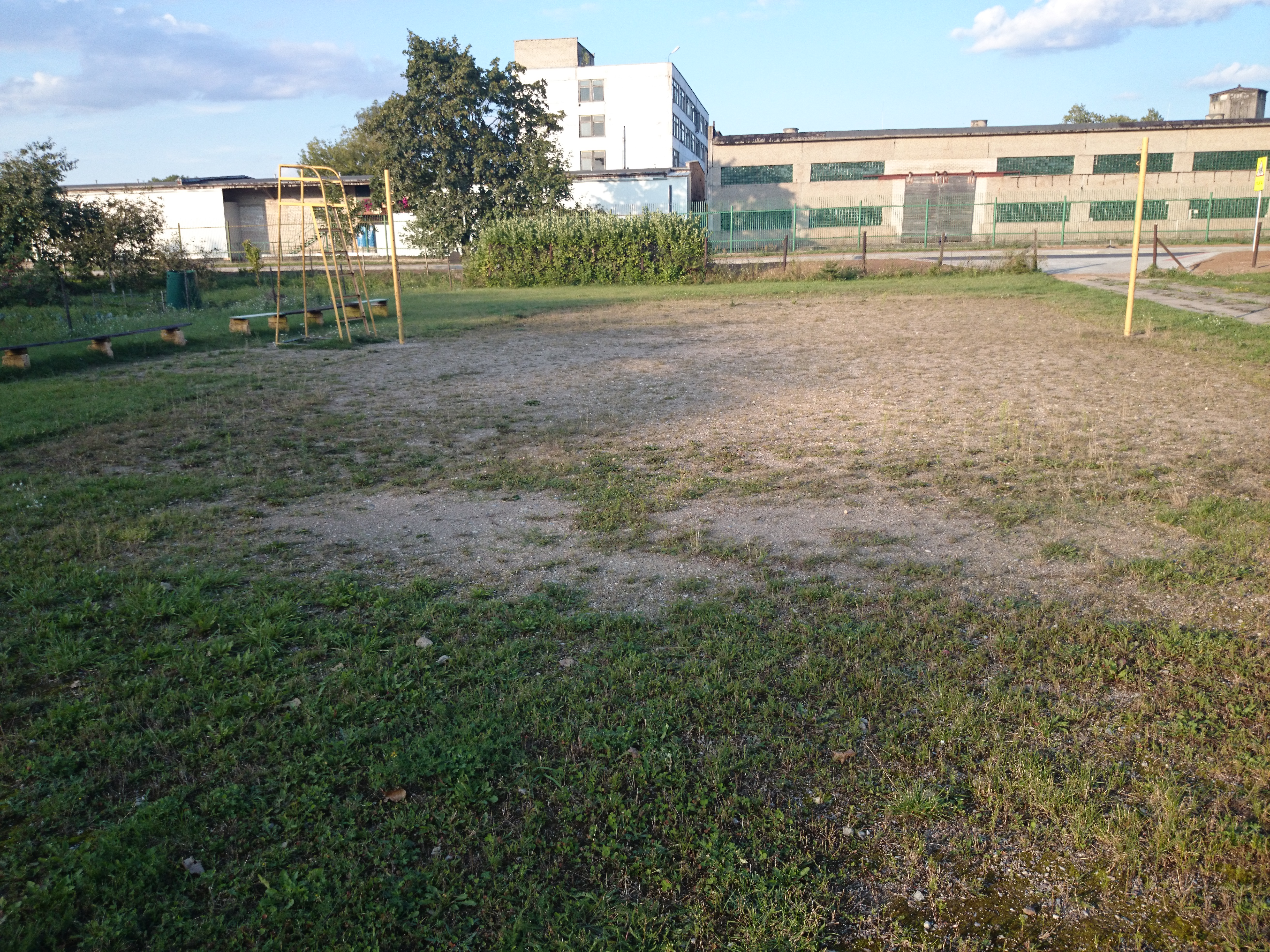 Lietavos pagrindinė mokykla